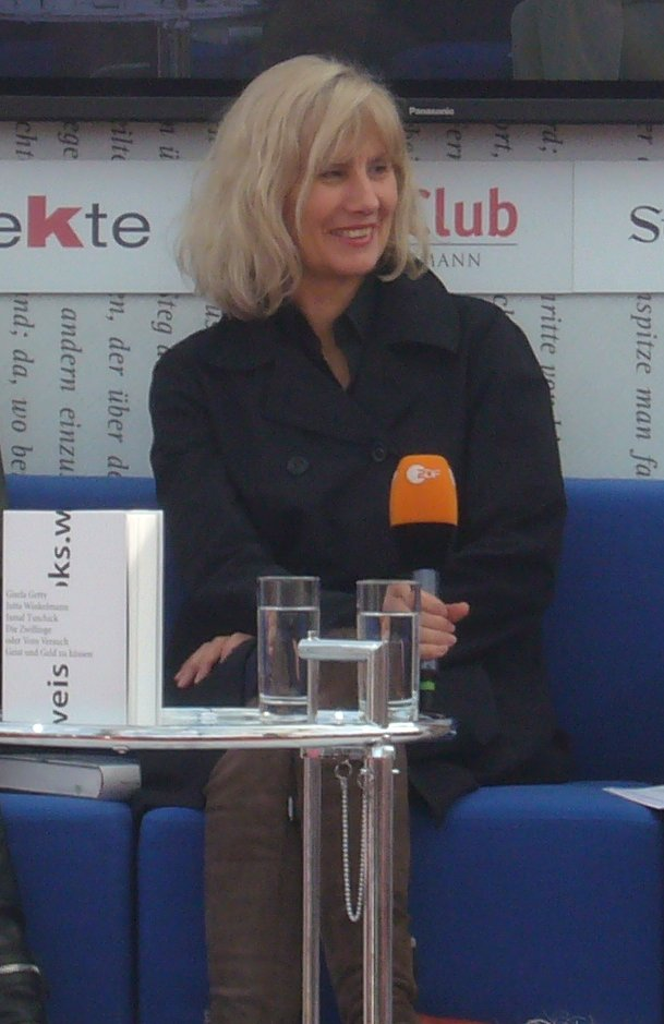 Jutta Winkelmann (das blaue sofa), 15. März 2008.